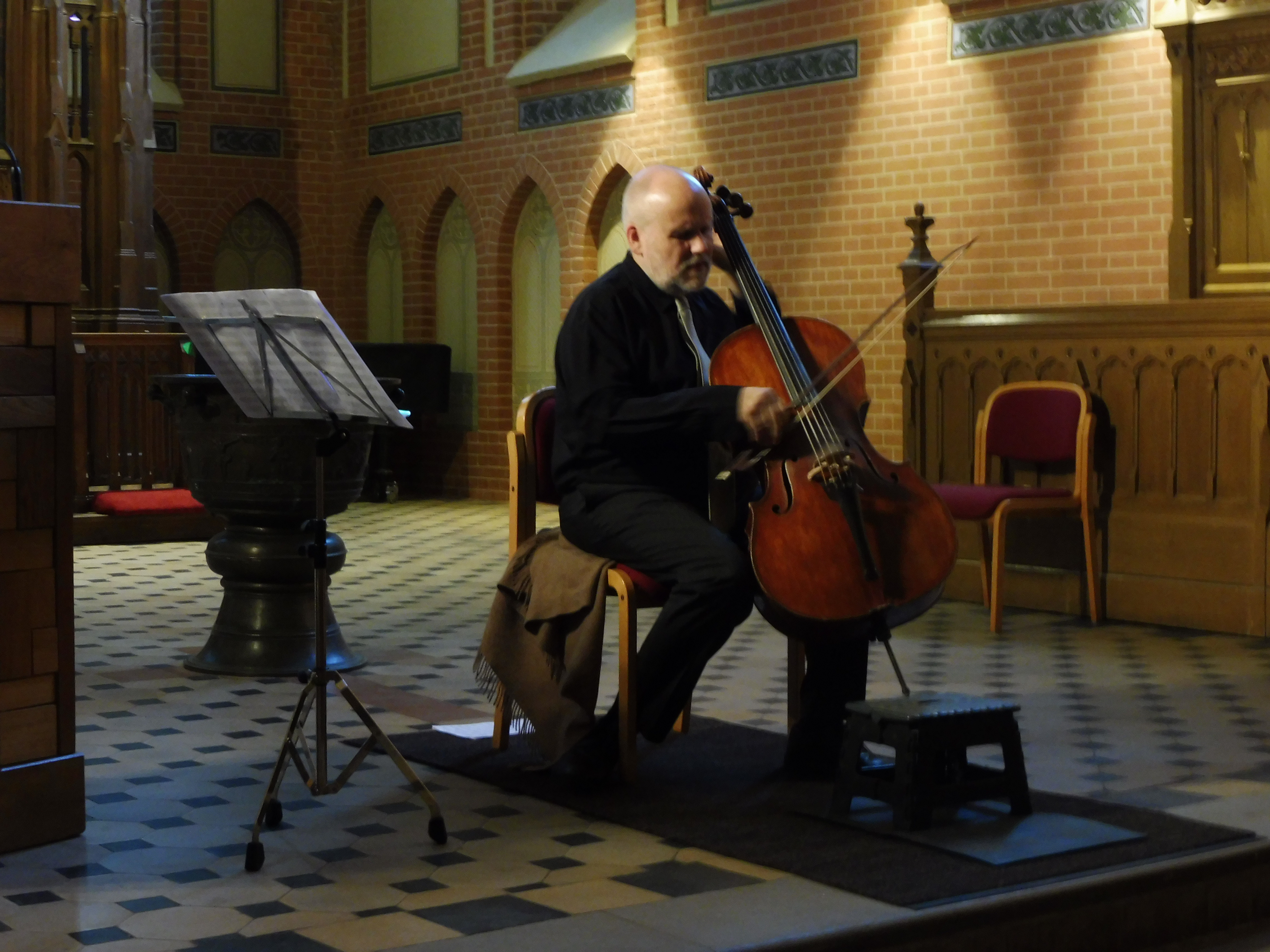 Ludwig Frankmar beim Stimmen seines Barockcellos in der Plauer Marienkirche